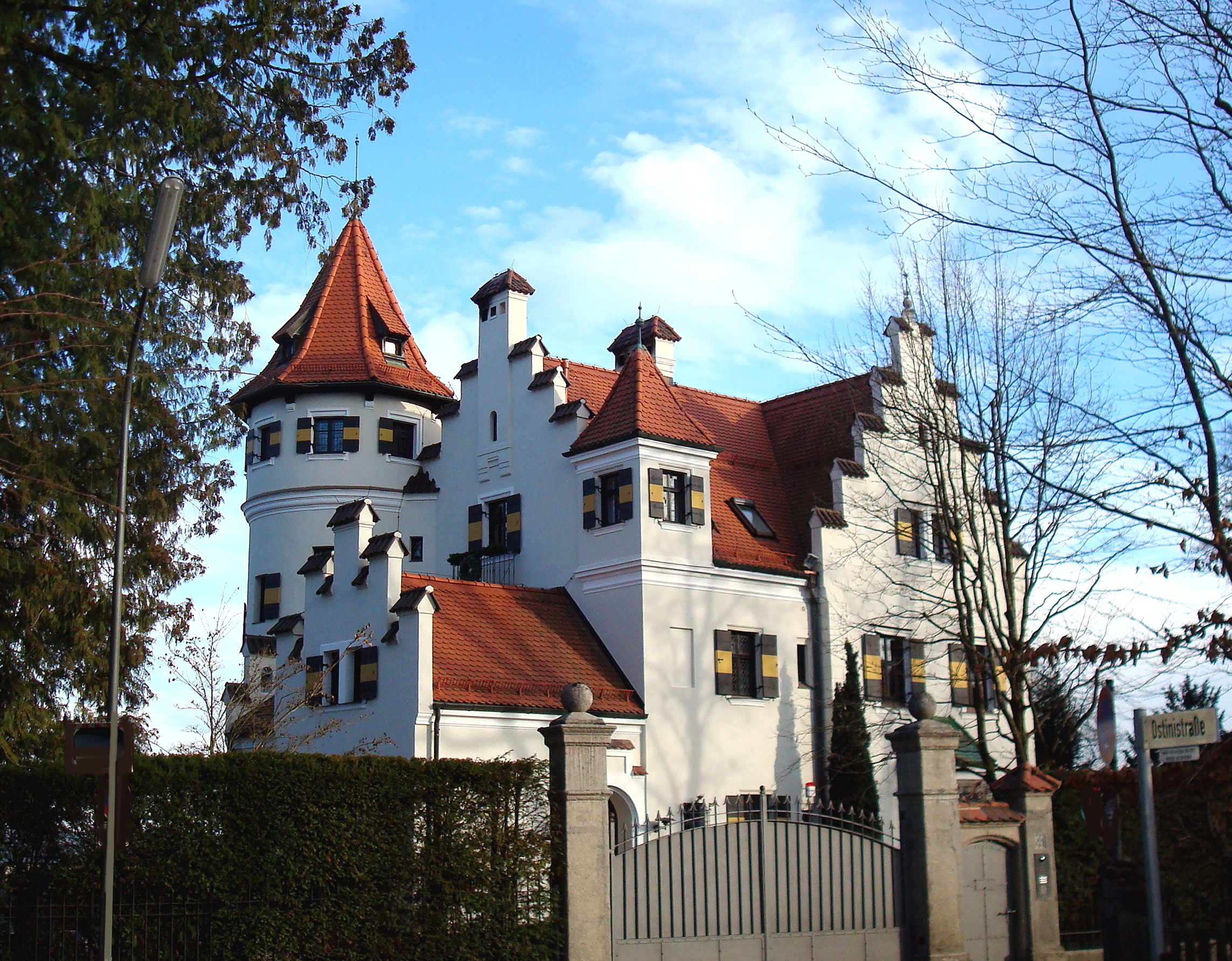 Pöcking, Feldafinger Straße 41, Villa Riccius. Der Name der Villa bezieht sich auf die Familie Riccius, die das Anwesen 1908 kaufte und bis in die 1960er Jahre in ihrem Besitz hatte. Erbaut wurde der zweigeschossige, gotisierende Gruppenbau mit Kreuzgiebel, rundem Eckturm und Staffelgiebeln 1898 von dem Architekten Leonhard Romeis für den Münchner Kaufmann Karl Hausmann.